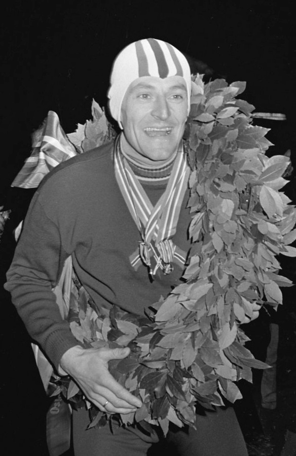 Europese Schaatskampioenschappen te Oslo, Europees Kampioen Fred Anton Maier in de krans.